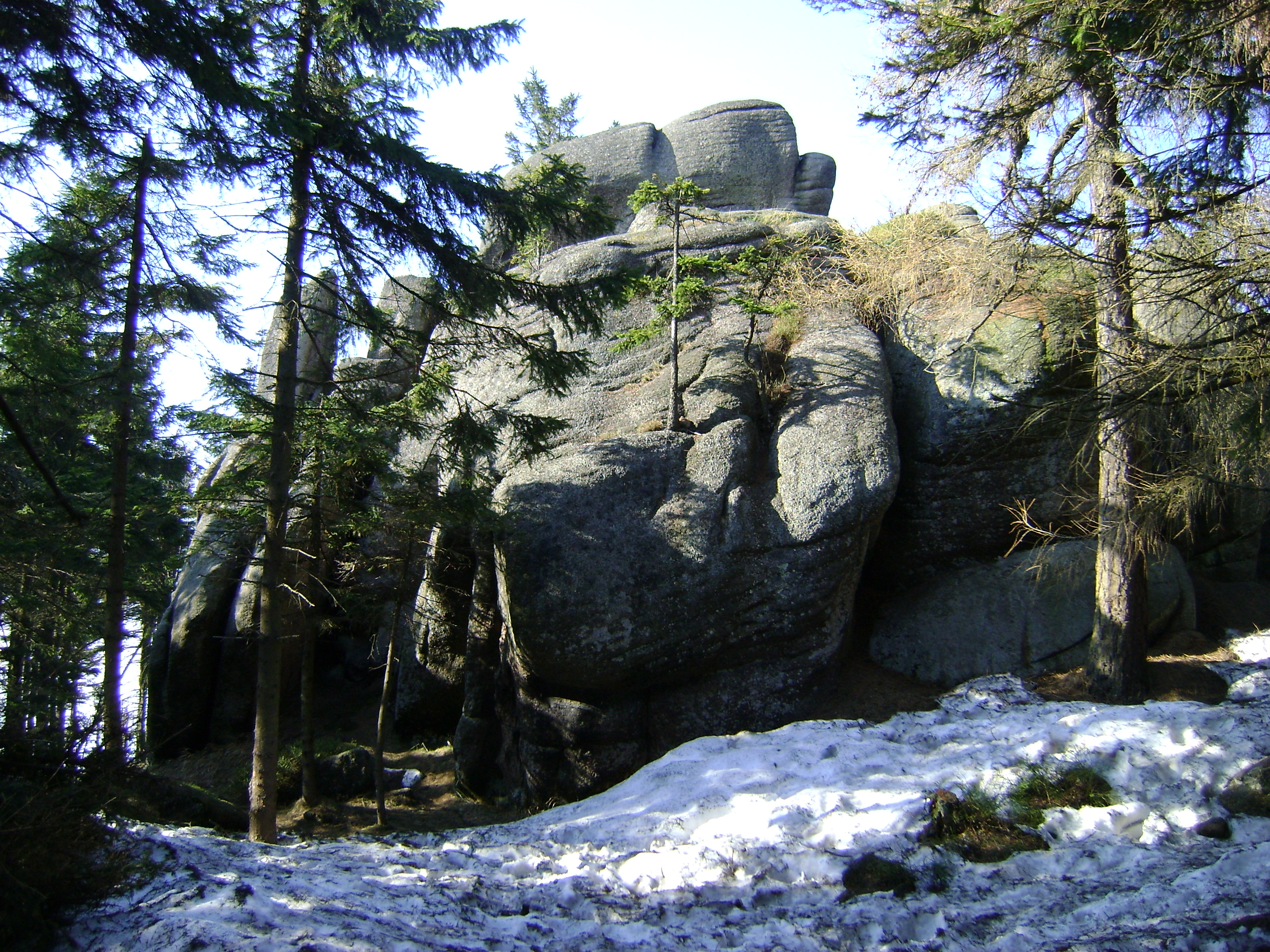 Formy skalne nawzniesieniu Ostra Mała w południowo-zachodniej Polsce w Sudetach Zachodnich w Rudawach Janowickich woj. dolnośląskie. Jedna z form skalnych tzw. Koni Apokalipsy.